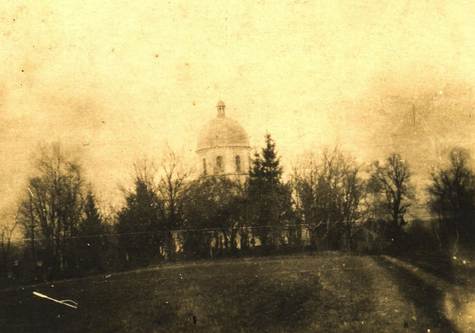 Святомиколаївська церква у селі Бужок (тепер Золочівський район, Львівська область).